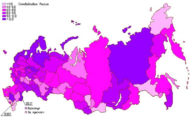 Результаты политической партии "Справедливая Россия" на парламентских выборах 2007 года (по регионам)